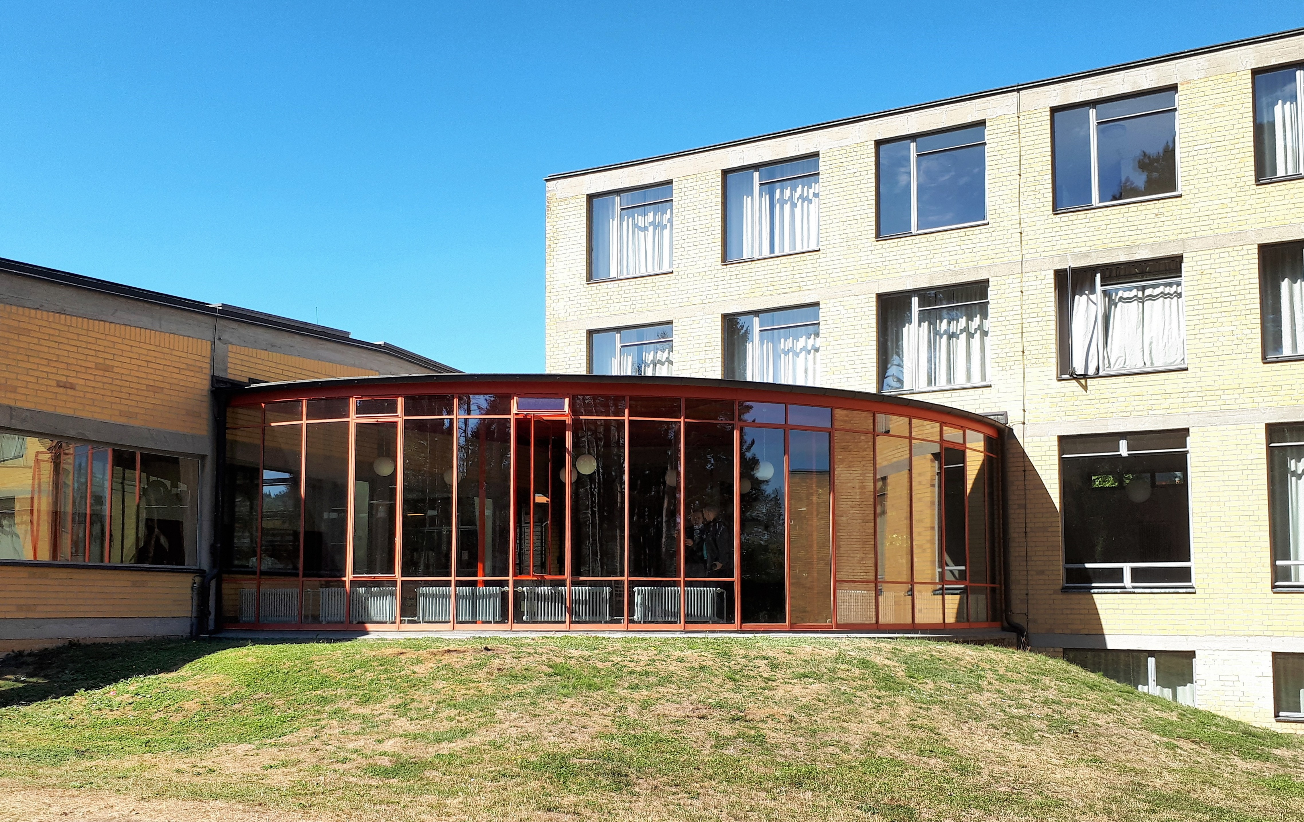 Bernau ADGB-Schule Meyer-Wittwer-Bau Pavillon